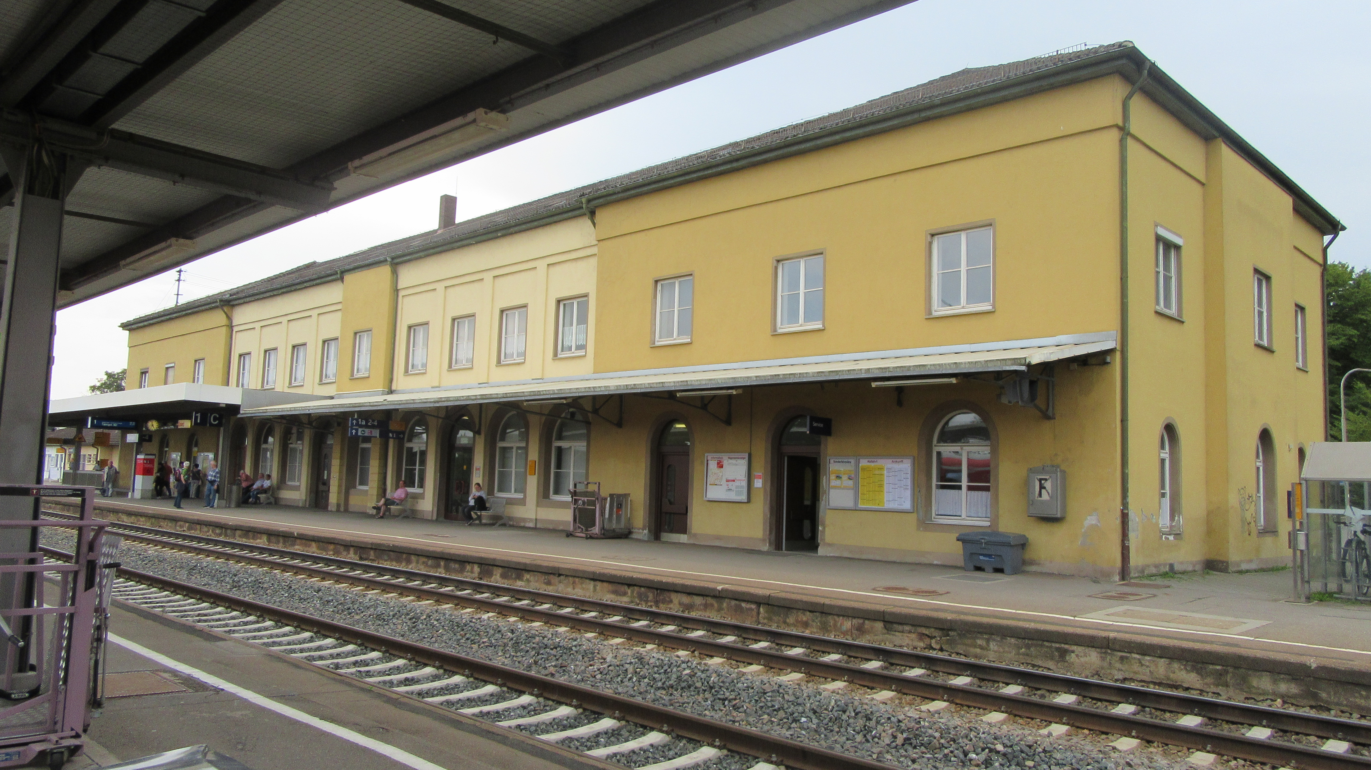 Das Empfangsgebäude des Bahnhofs Aulendorf von der Gleisseite am 17. August 2016